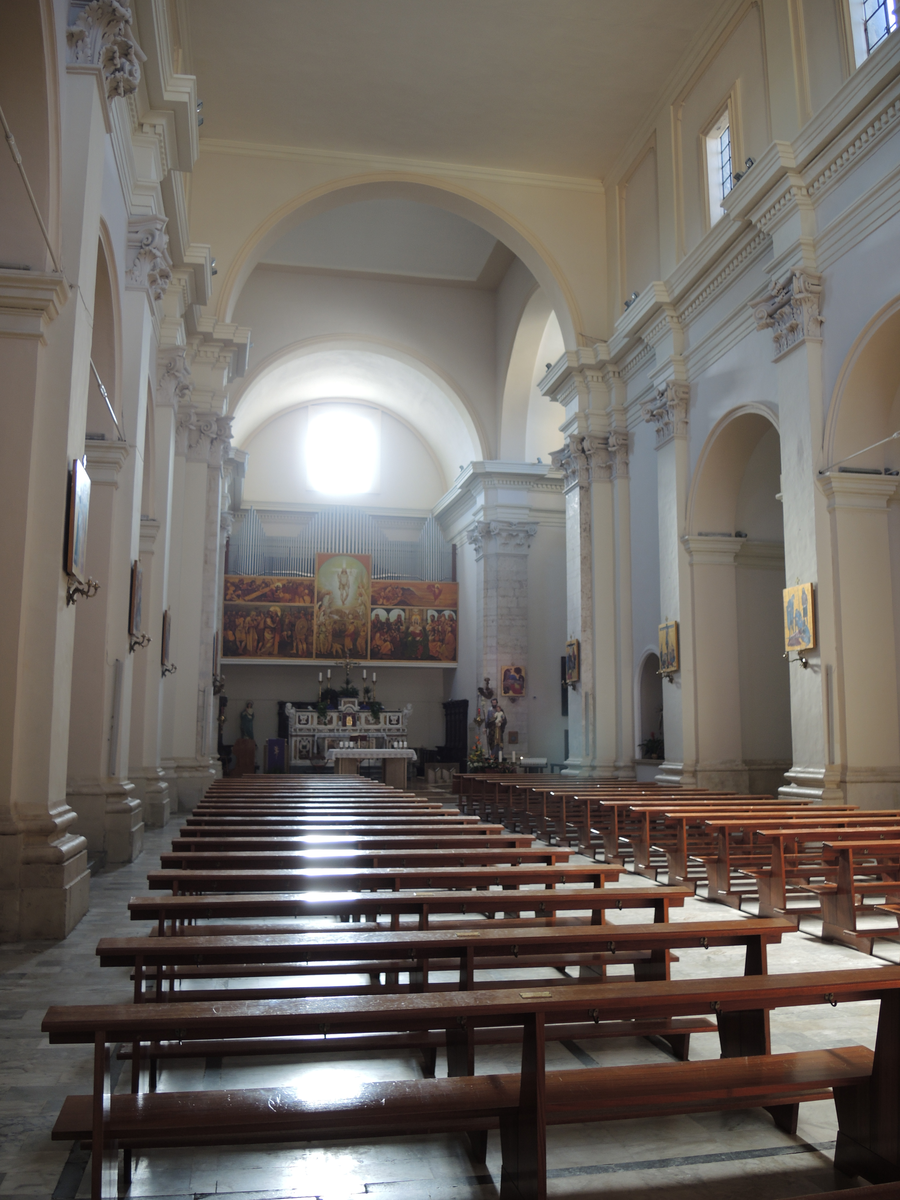 Popoli (PE): Chiesa di San Francesco